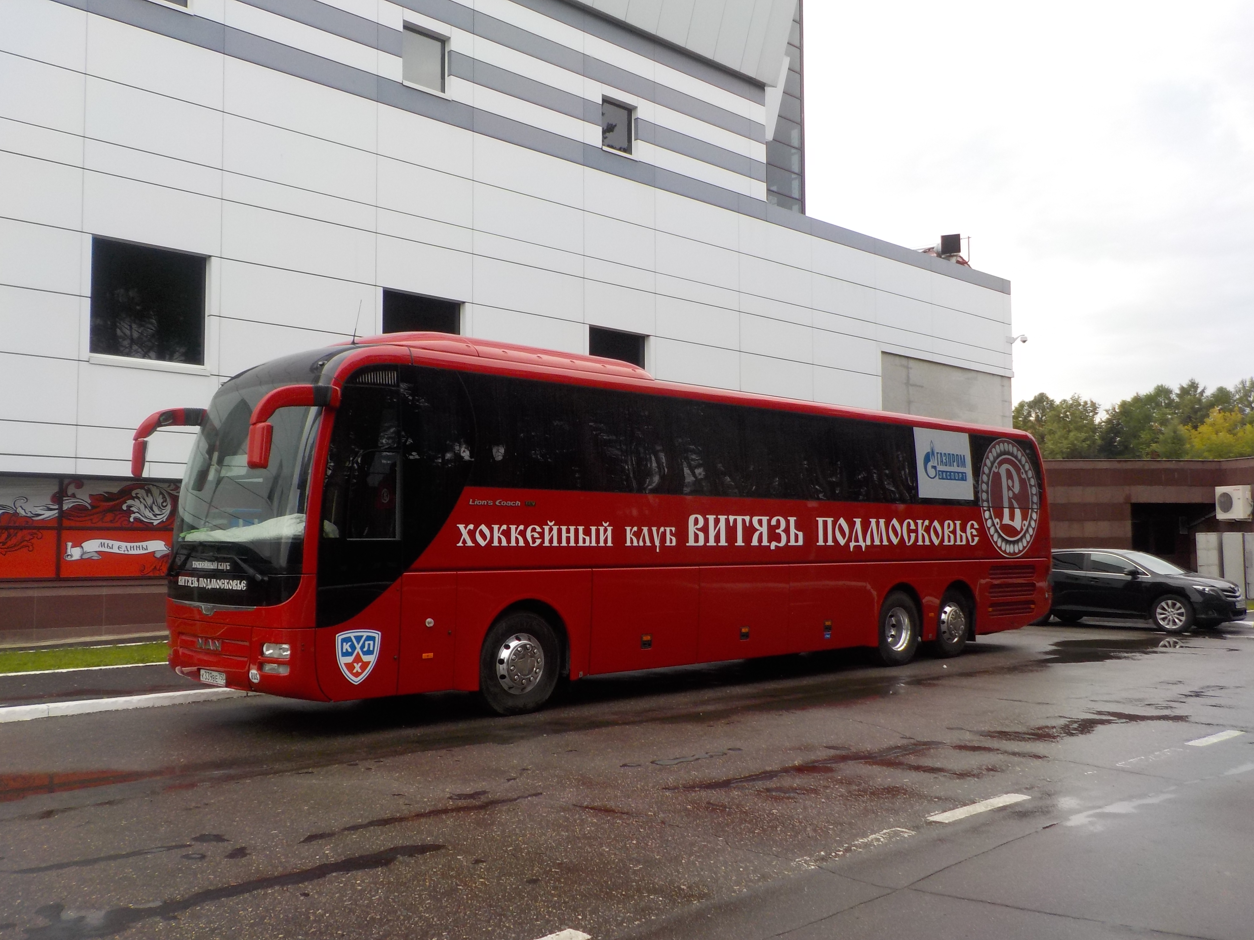 Автобус хоккейного клуба Витязь Подольск